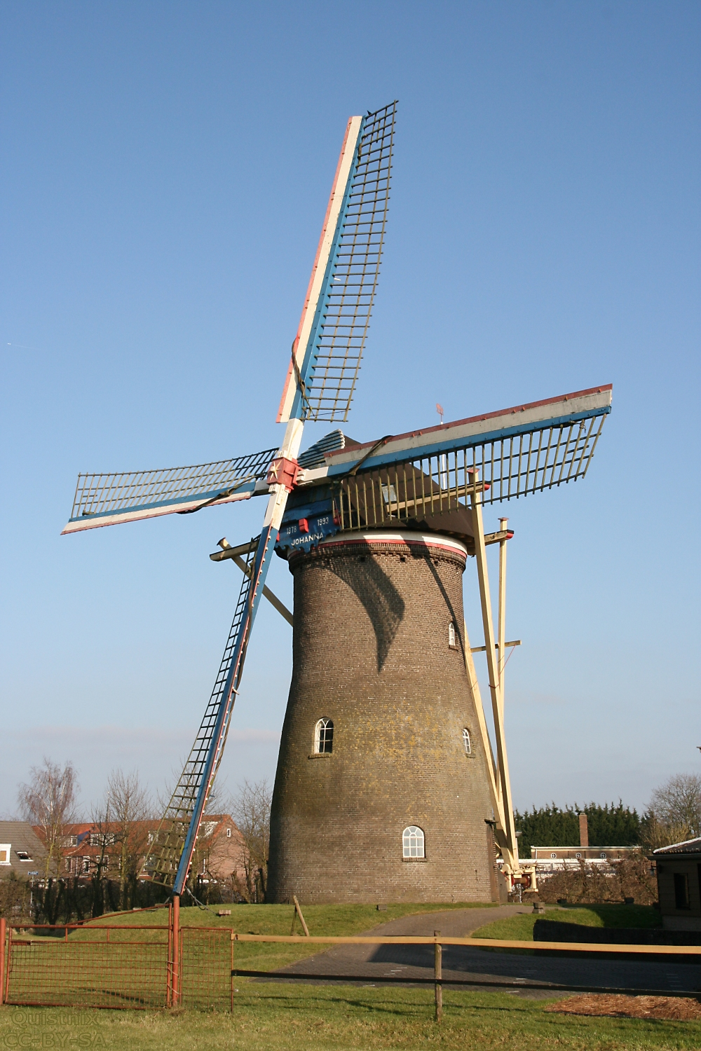 Culemborg:Molen Johanna